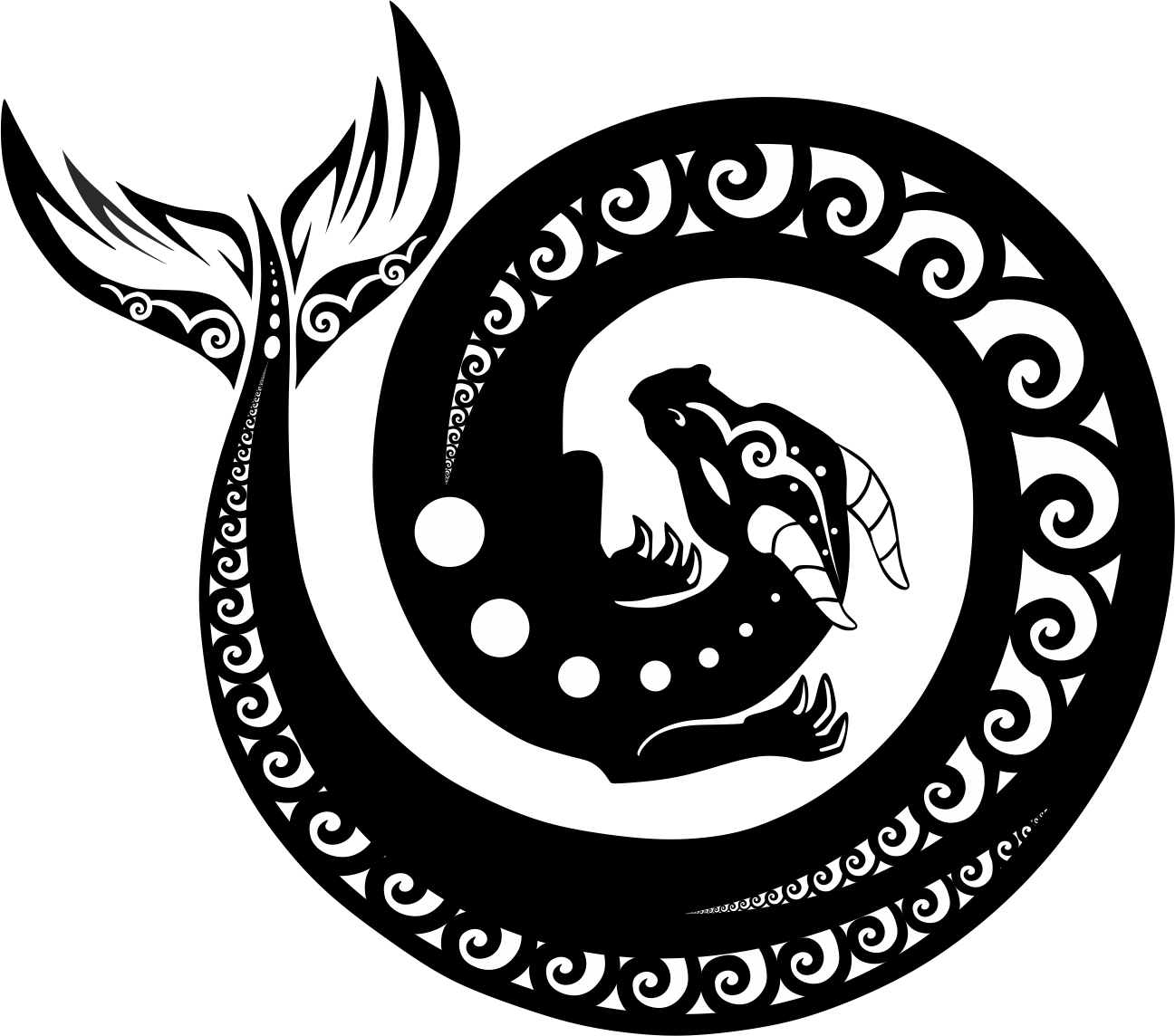 Сармак(Дракон)